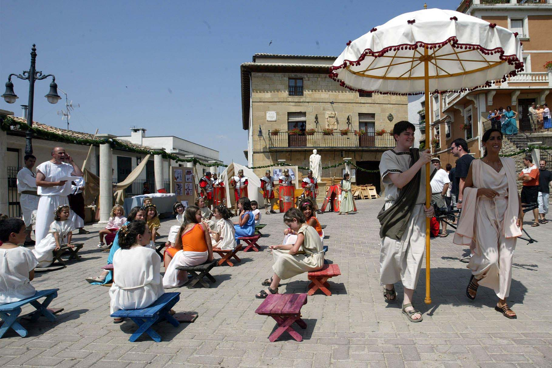 Amplio programa de actividades consagrado a recrear la vida en Andelos hace 2000 años y a divulgar la riqueza histórica de la localidad.